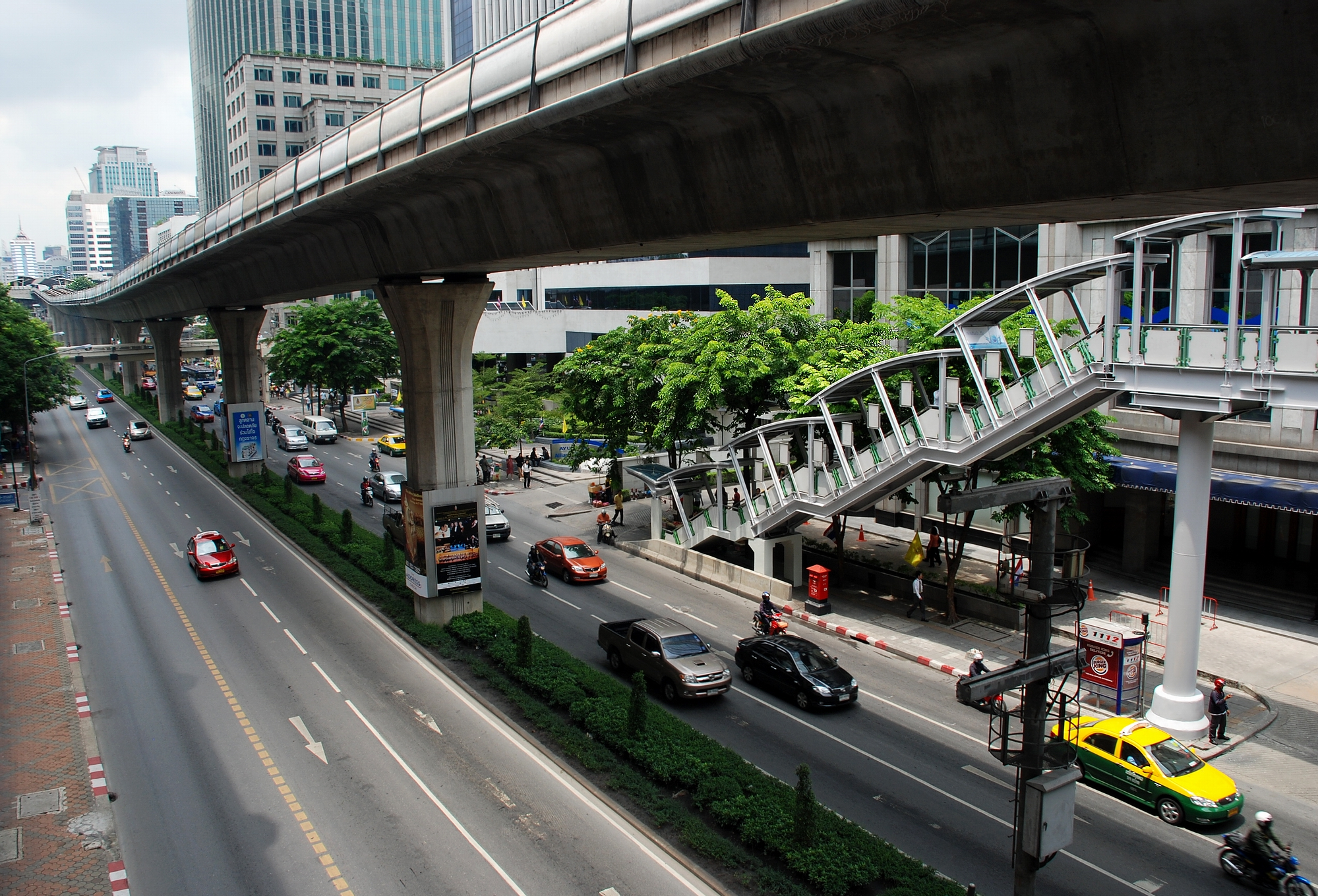 Thanon Phloenchit, Bangkok, Thailand.